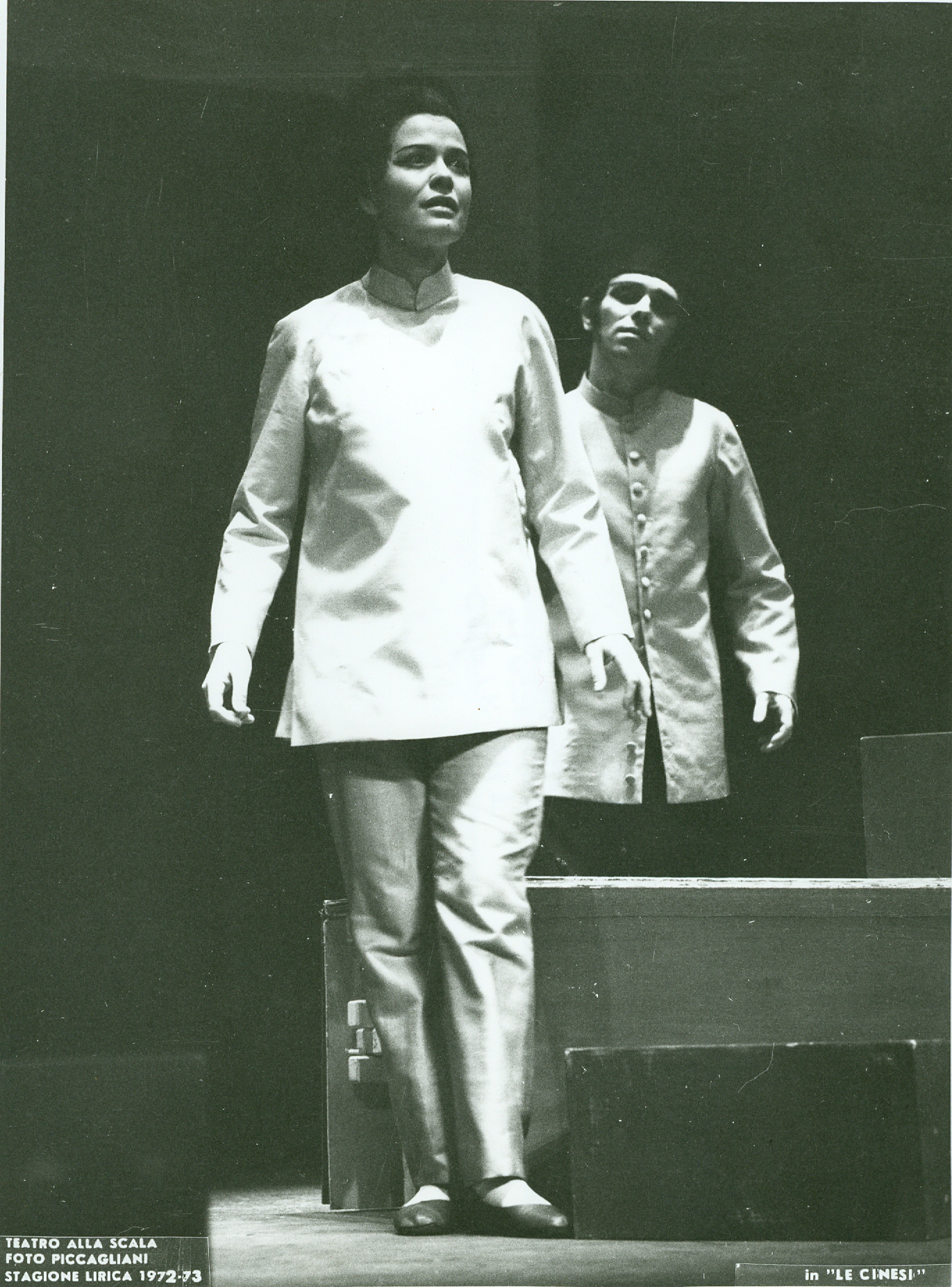 Carmen Lavani in Le Cinesi